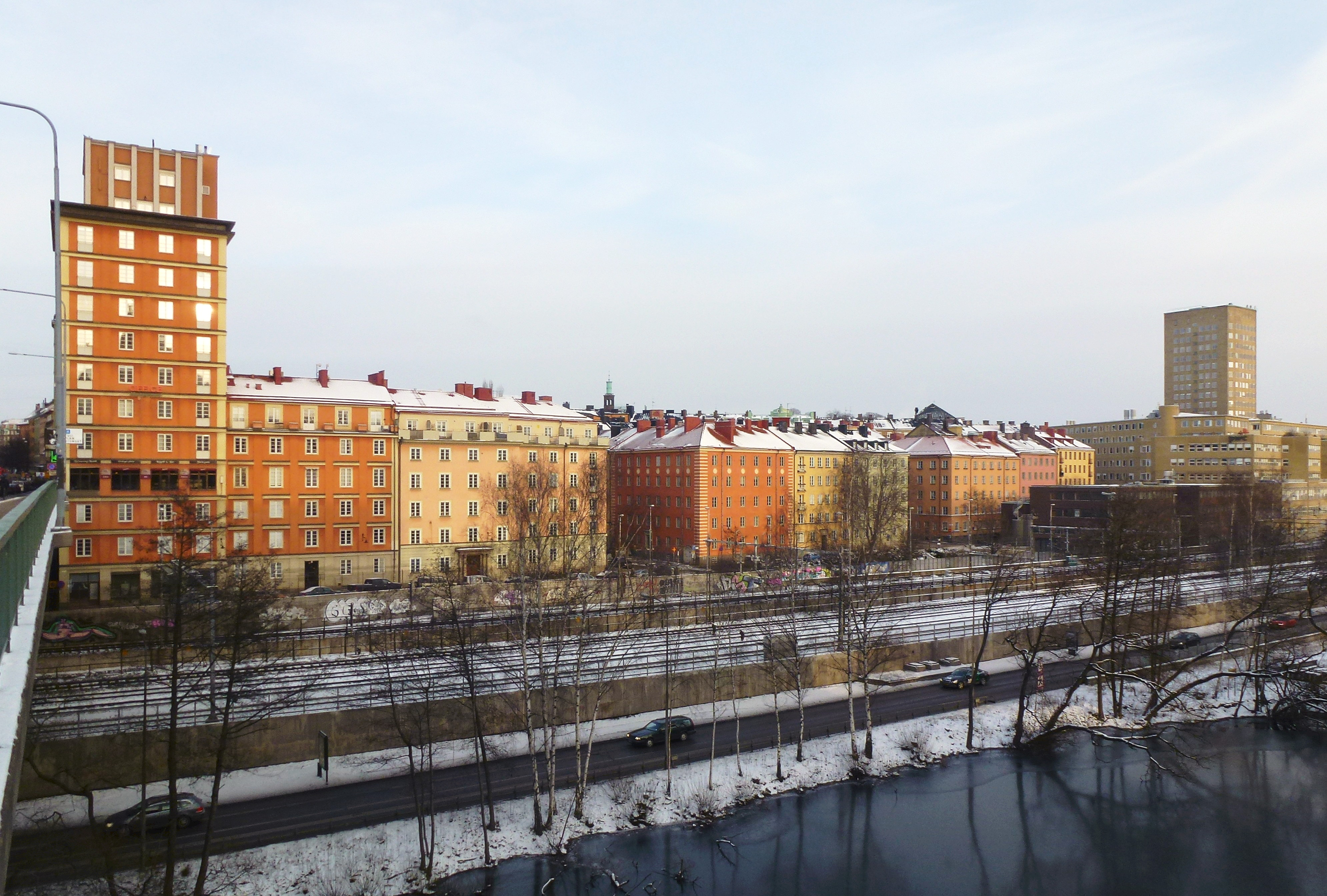 Atlasområdet från Sankt Eriksbron med Bonnierhuset längs till höger